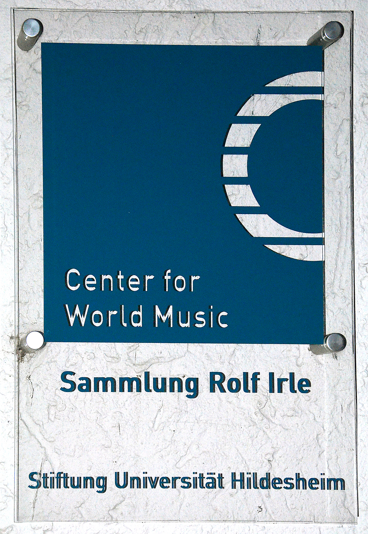 Transparente Tafel an der ehemaligen Timotheuskirche, dem heutigen Center for World Music mit der Sammlung Rolf Irle der Stiftung Universität Hildesheim unter der Adresse Timotheus Platz ,Ecke Schillstraße in Hildesheim ...